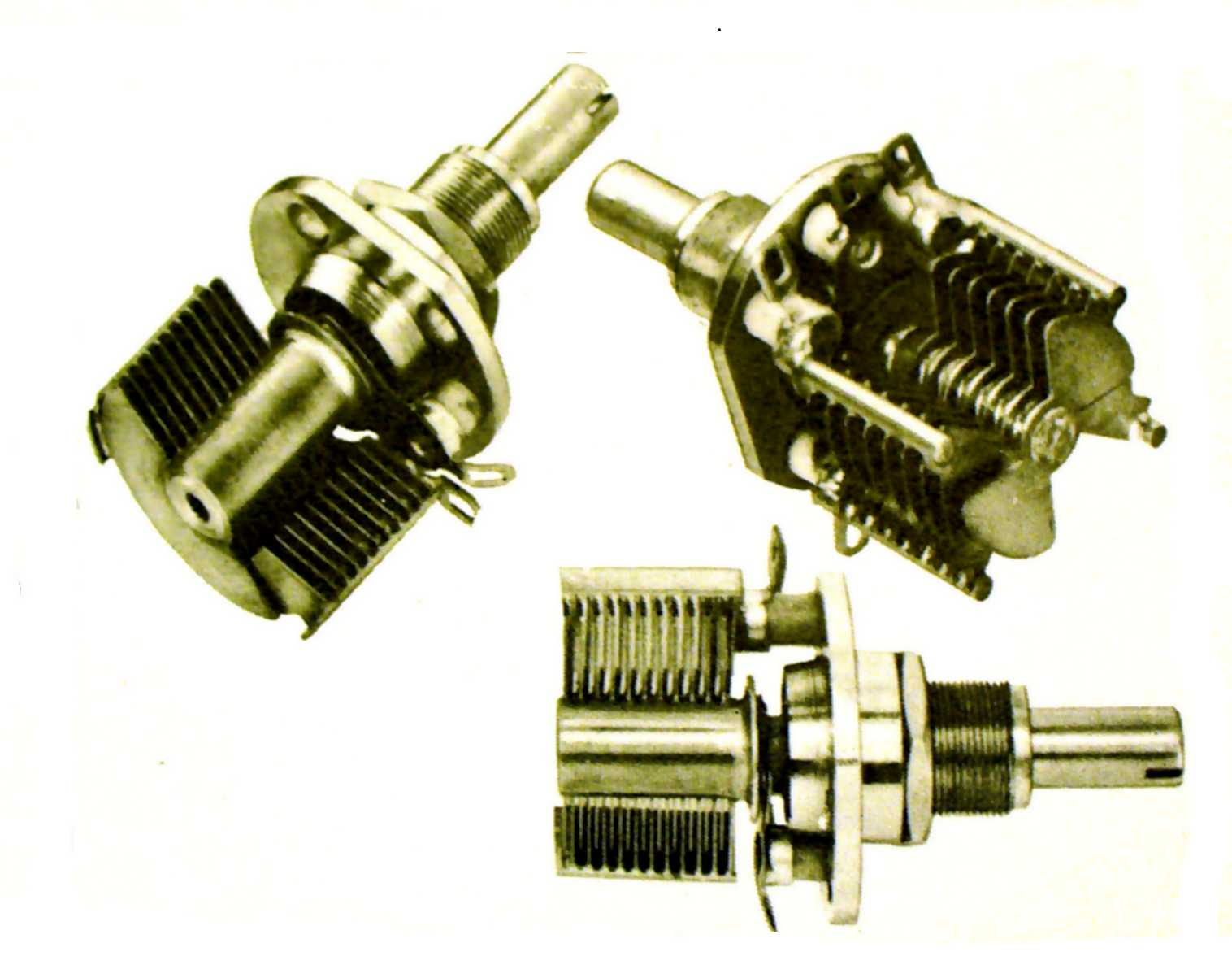 Variable Kondensatoren, Luft-Korrektionskondensatoren